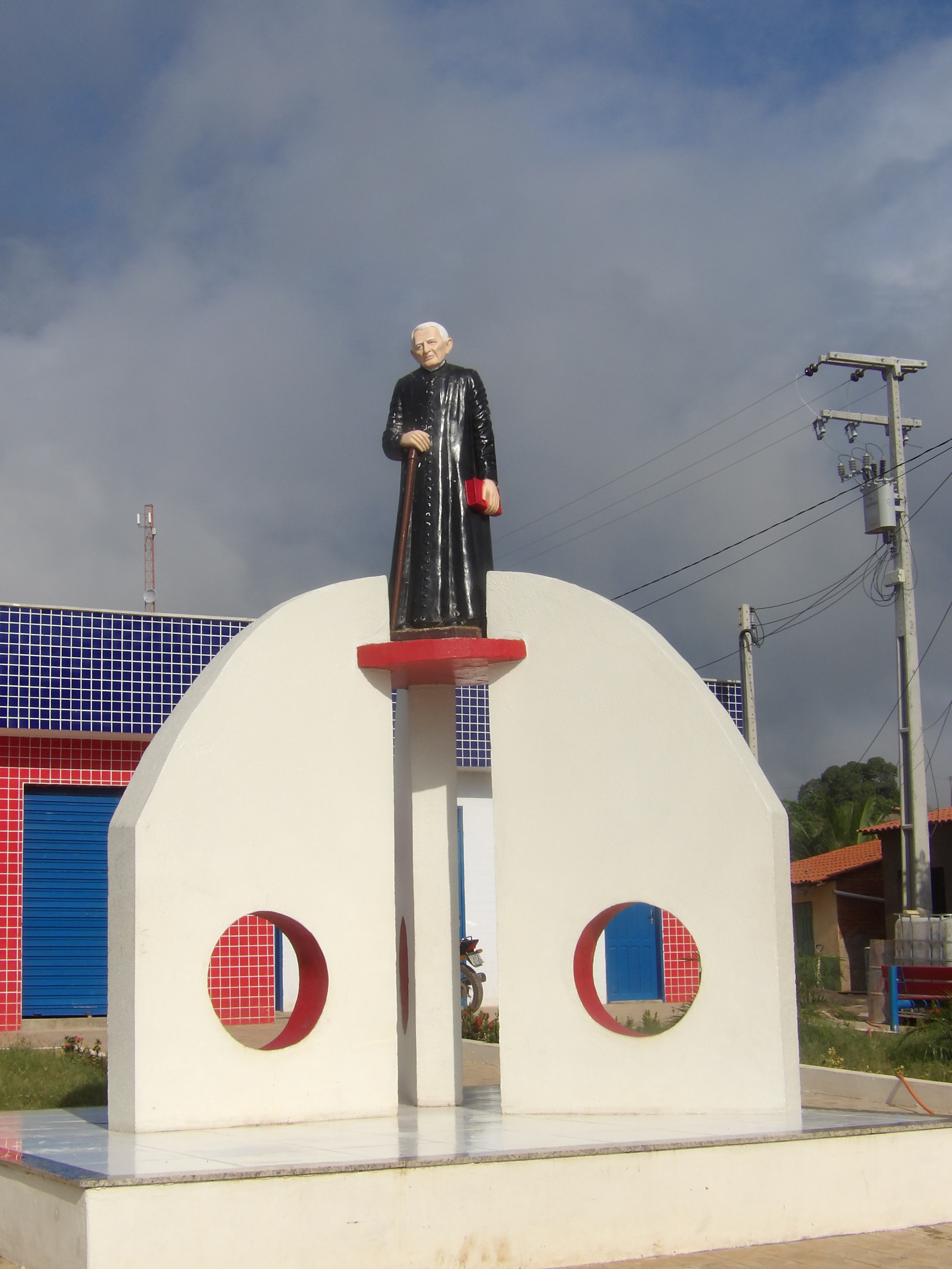 Foto do Pontal do Padre Cícero em Farias Brito